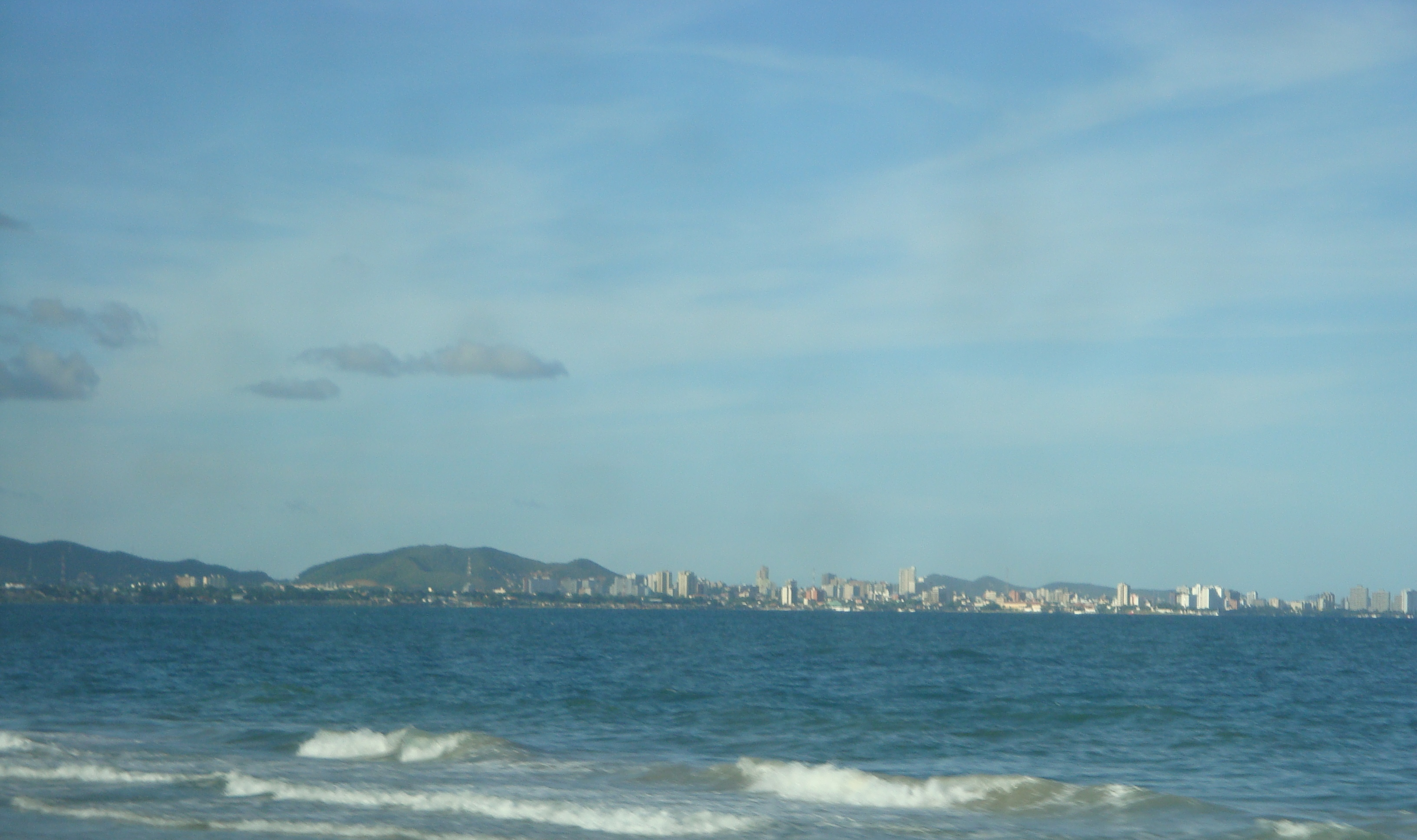 Vista panorámica de Porlamar desde La Isleta